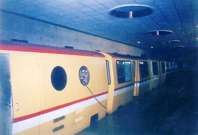 Электропоезд ЭП-002 «Турист» на станции Входные Ворота до модернизации. Новоафонская пещерная ЖД, 2003.